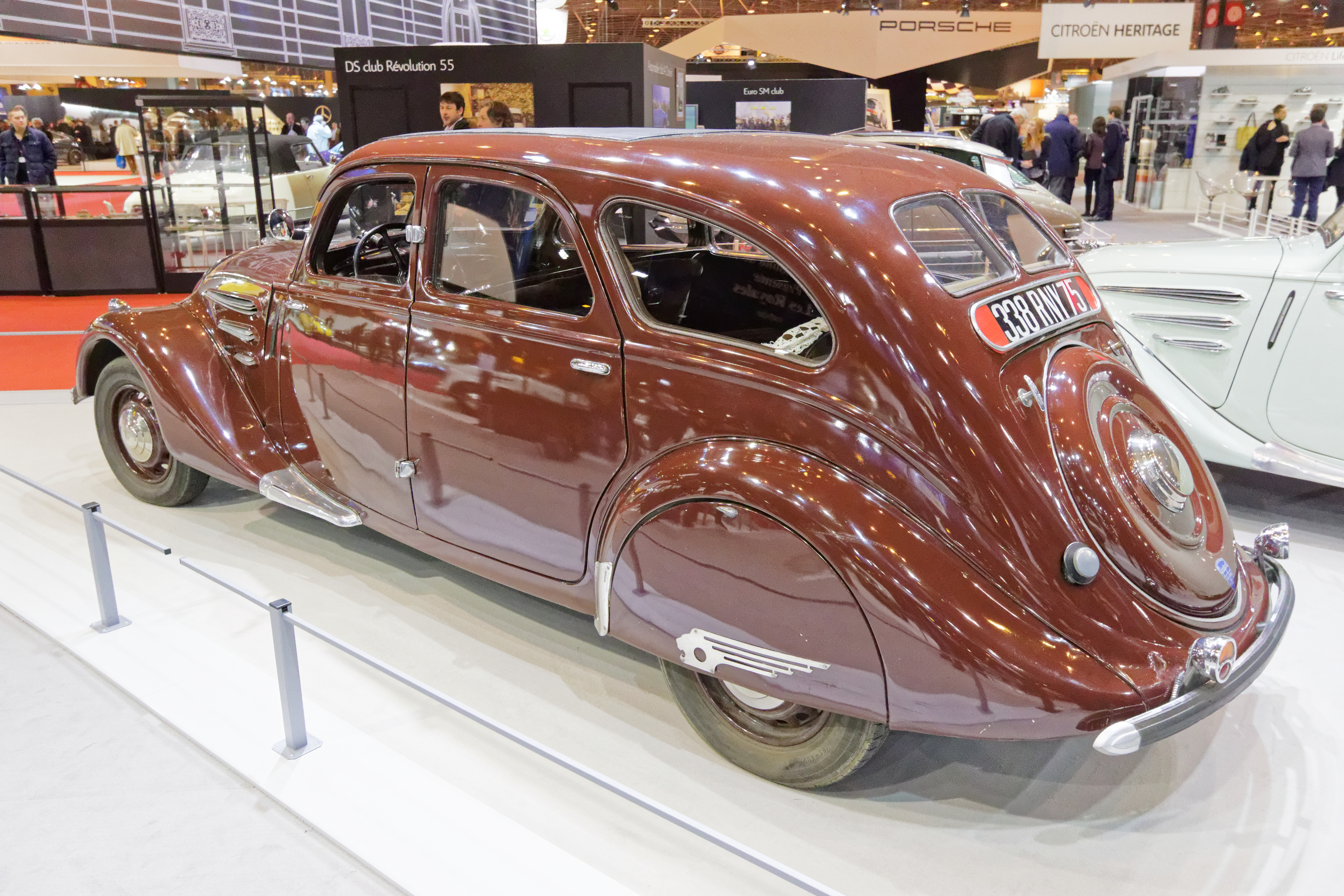 Une des voiture présentée lors du salon Rétromobile de Paris 2015